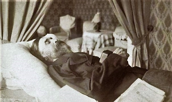 Černyševskij sul letto di morte